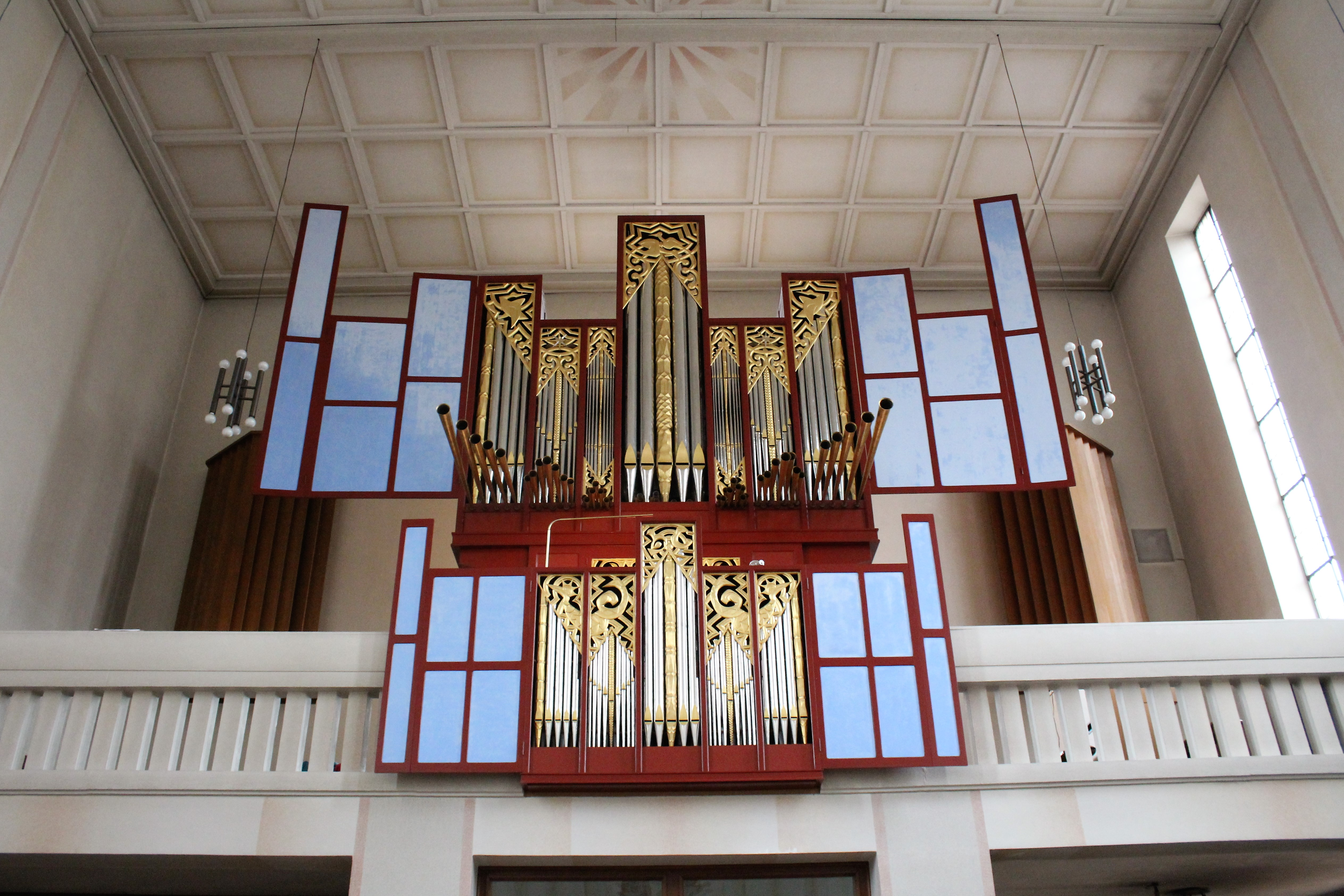 St. Marien, Leer-Loga, Ostfriesland, Deutschland